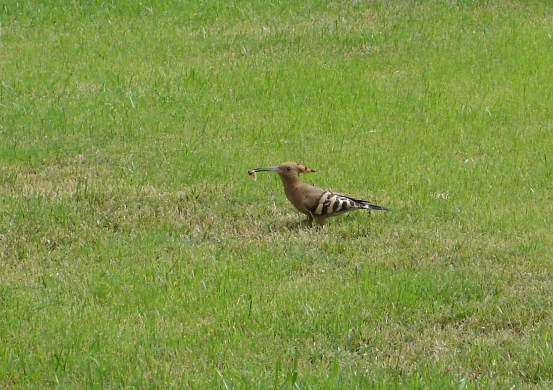 Búbos banka az Egyiptomi Múzeum kertjéből (Egyiptom, Kairó, Tahrír tér, Múzeum kert)